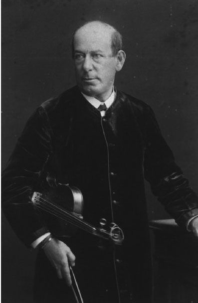 Reményi Ede magyar zeneszerző, hegedűművész.